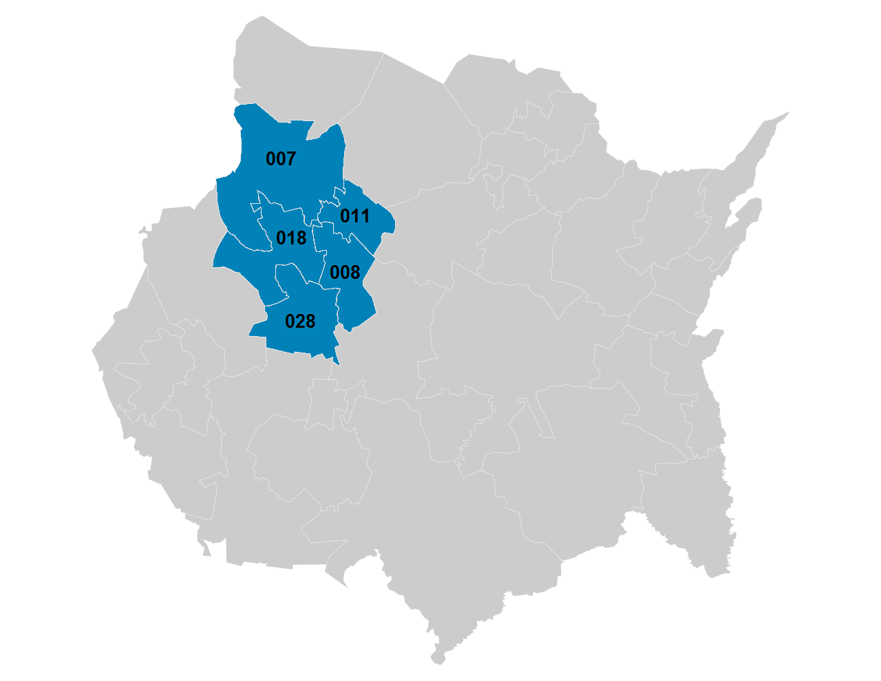 Municipios de la Zona metropolitana de Cuernavaca.